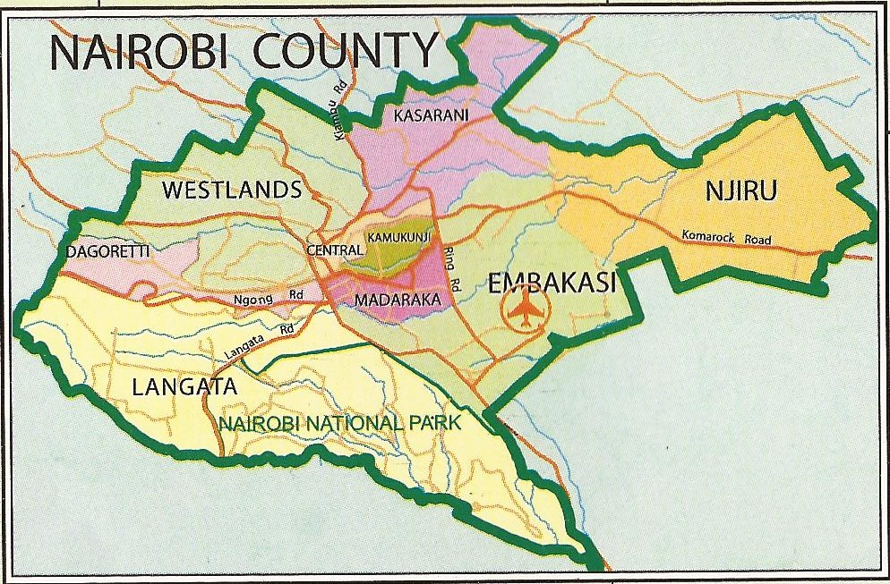 Le comté de Nairobi et ses 9 districts administratifs